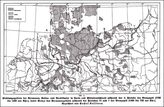 Siedlungsgebiete der Germanen, Kelten und Nordillyrier in Nord- und Mitteldeutschland während der II. Periode der Bronzezeit (1750 bis 1400 vor Chr.), sowie Grenze der Germanengebiete während der Perioden III und V der Bronzezeit (1400 bis 750 vor Chr.).